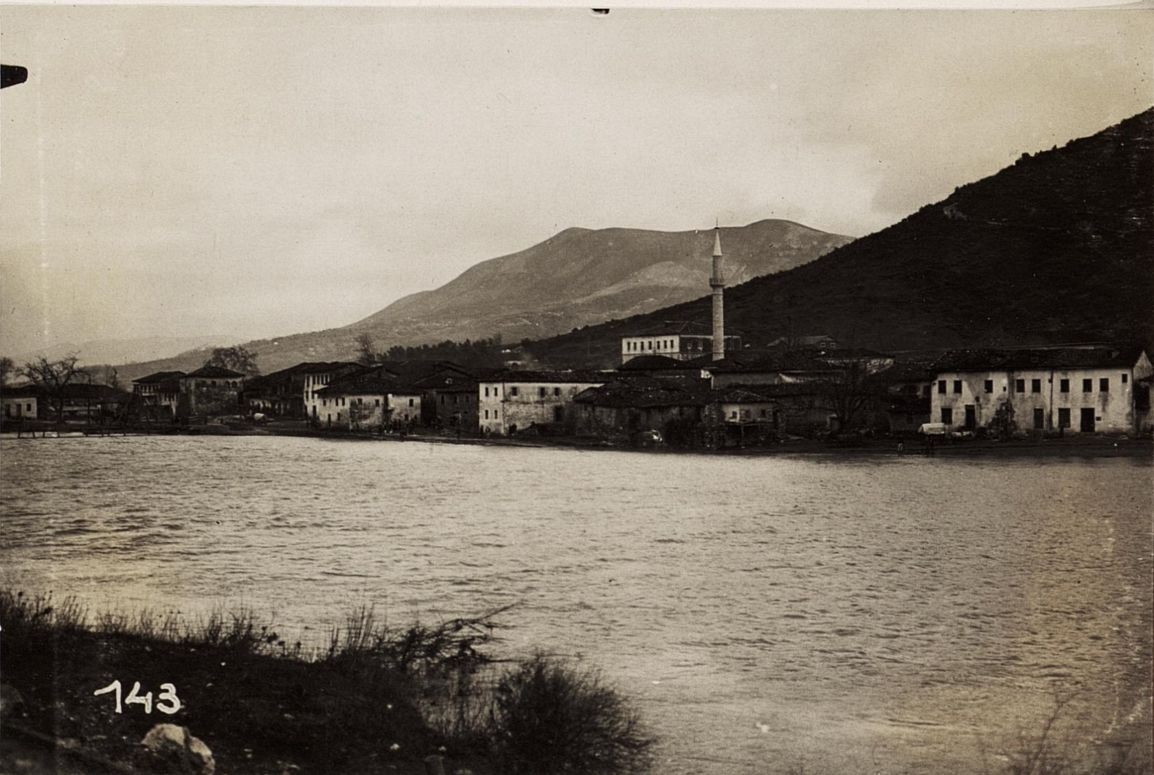 Alessio (oder Lezha in Albanien)